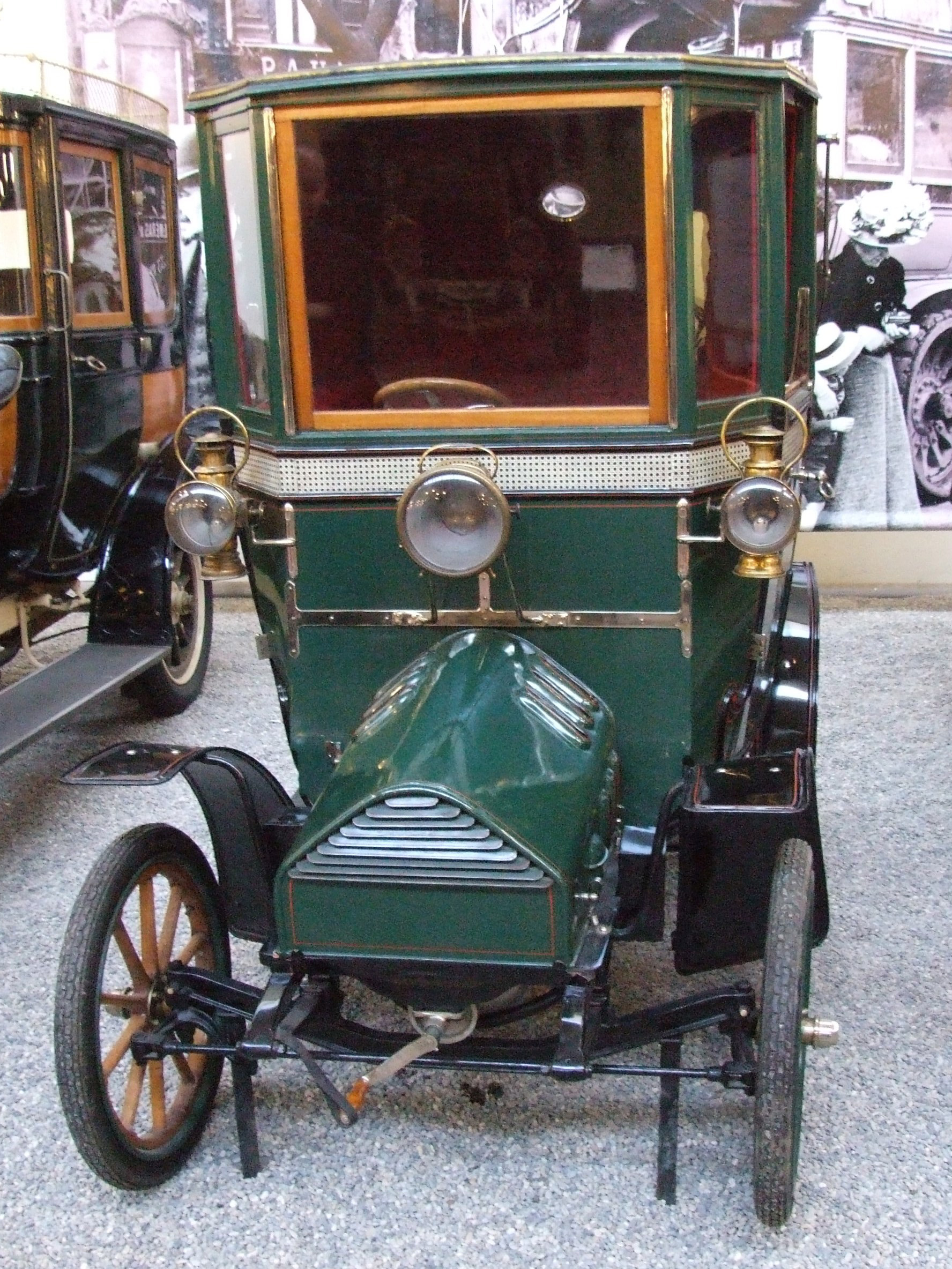 Der luftgekühlte Piccolo von Hugo Ruppe, Piccolo Landaulet, 1907, 7 PS, 2 Zylinder, 794 ccm, 50 km/h, Cité de l’Automobile – Musée National – Collection Schlumpf, Mülhausen, Frankreich